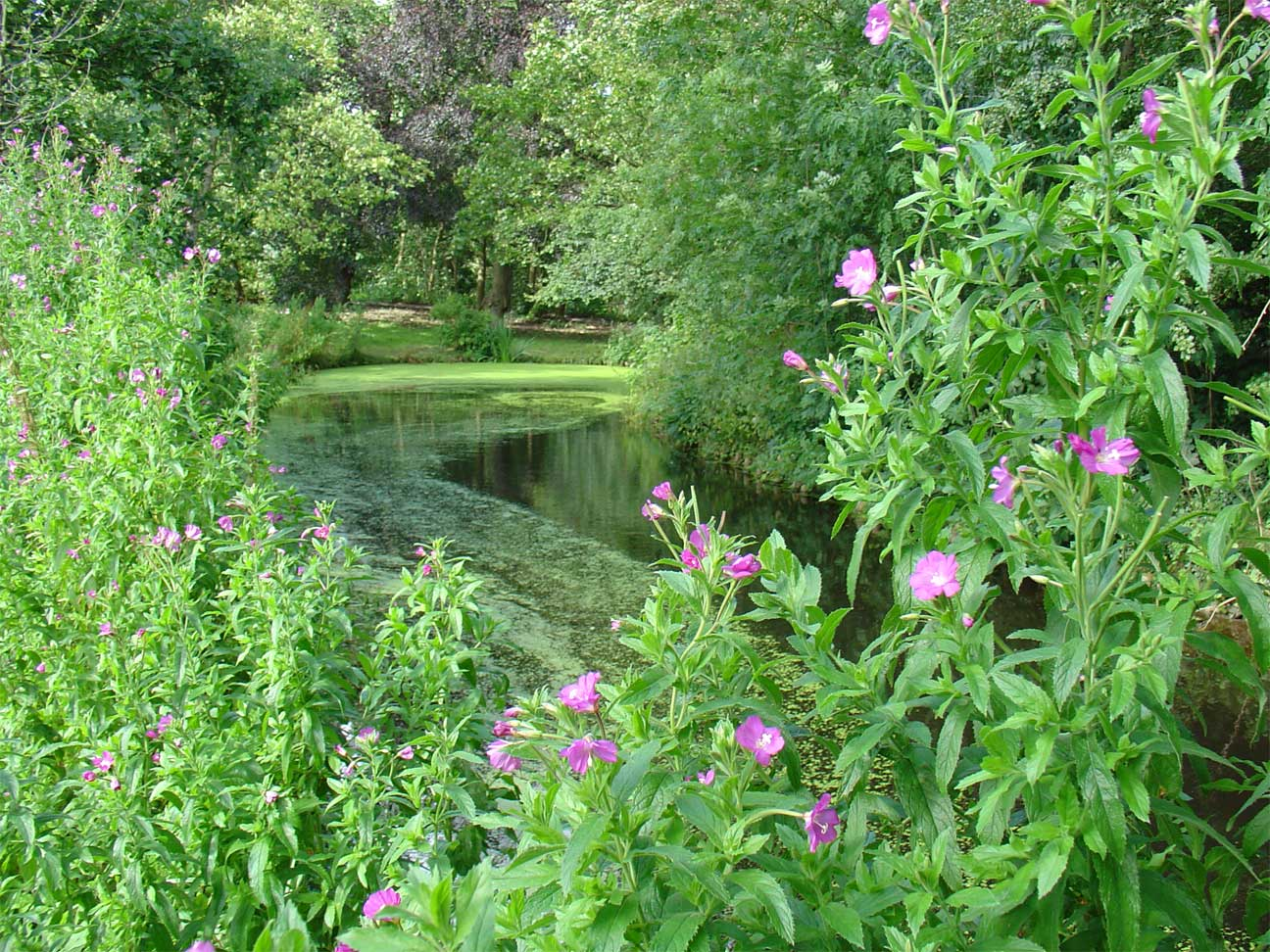 Landgoed van Ekenstein (bij Appingedam) ontworpen door Lucas Pieters Roodbaard